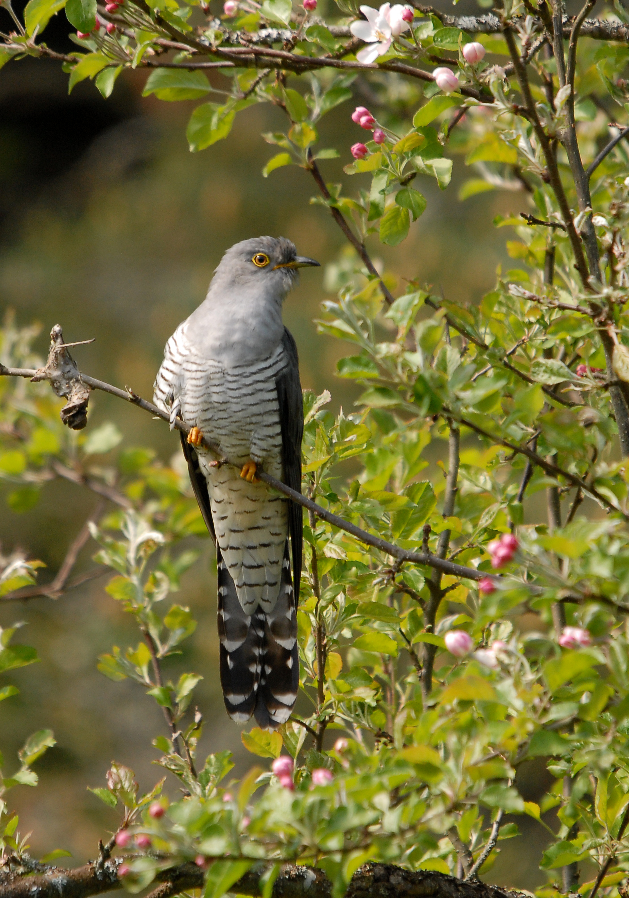 Kägu istumas kuldrenetil Cuculus canorus